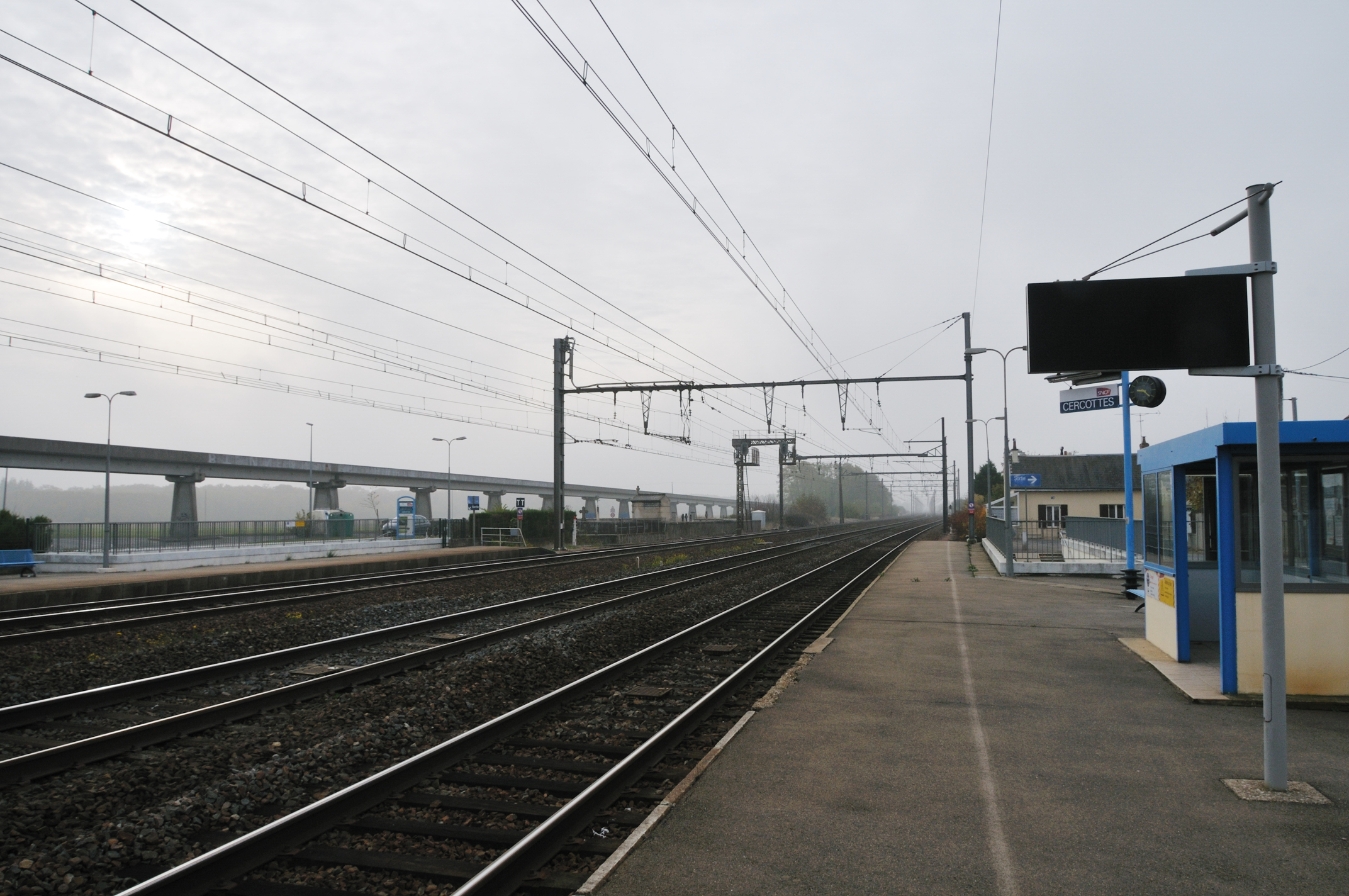 Gare de Cercottes, Loiret, France avec au fond l'aérotrain.